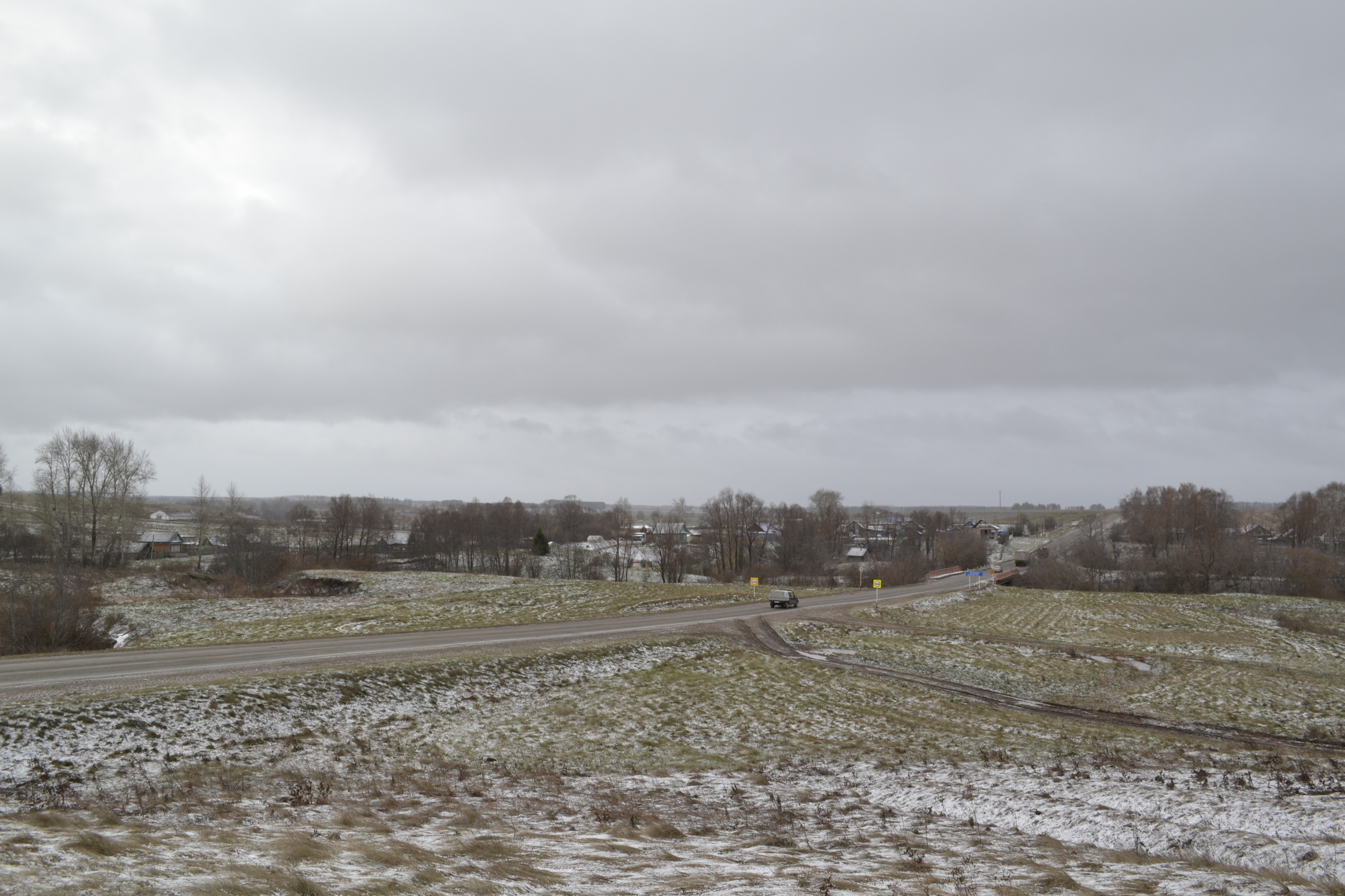 Башҡортса: Яңауыл районы Сулпый ауылы урамы. Ансар Нуртдинов архивынан.